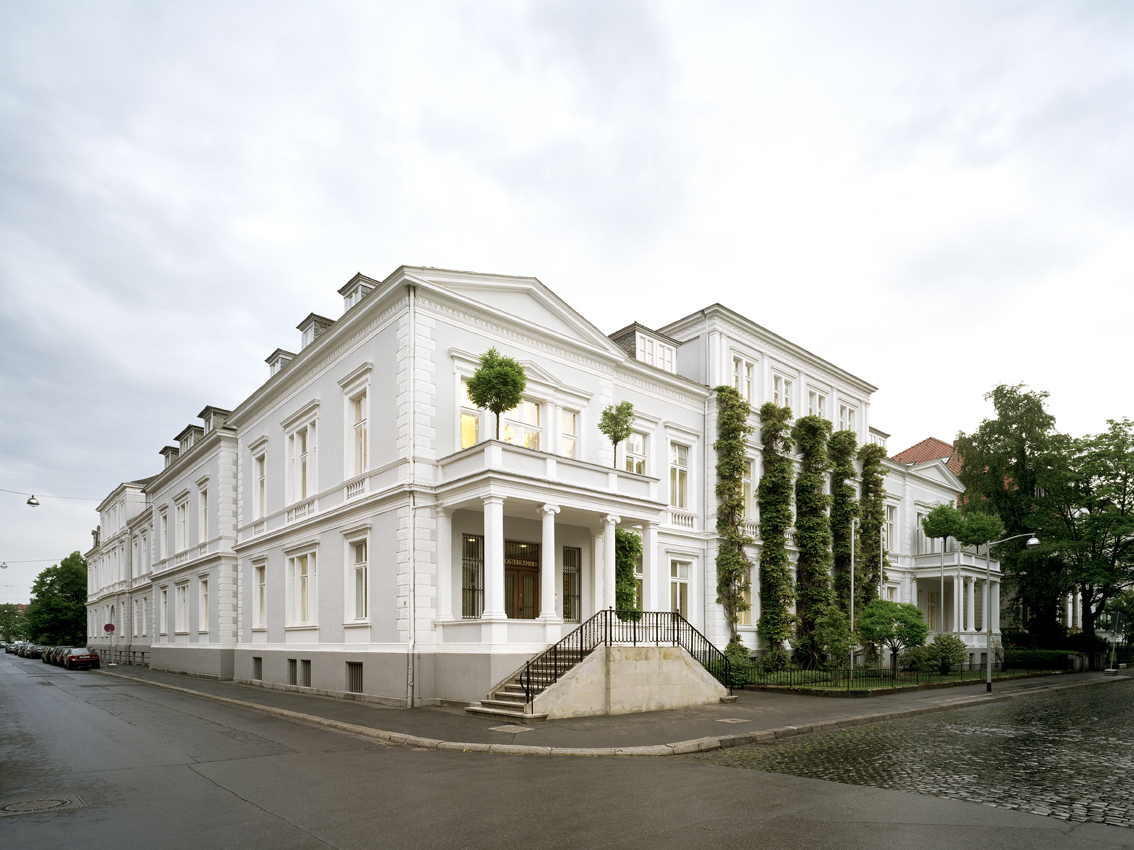 Bild Hauptgebäude Klosterkammer